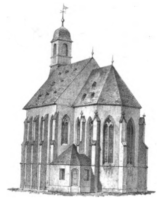 Wiesbaden: Rekonstruktionsversuch der Mauritiuskirche im Zustand um 1750